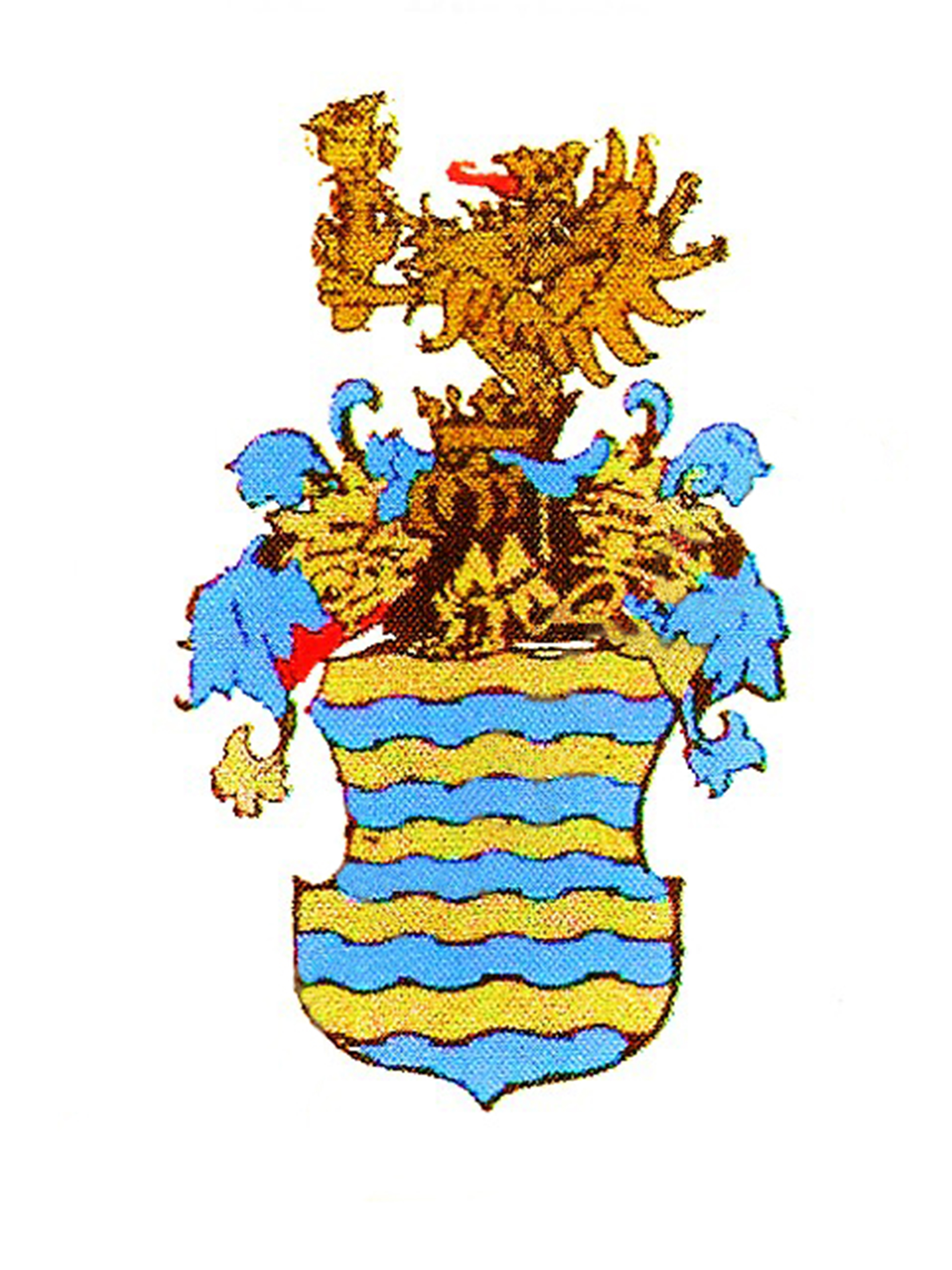 Grb obitelji Hreljac